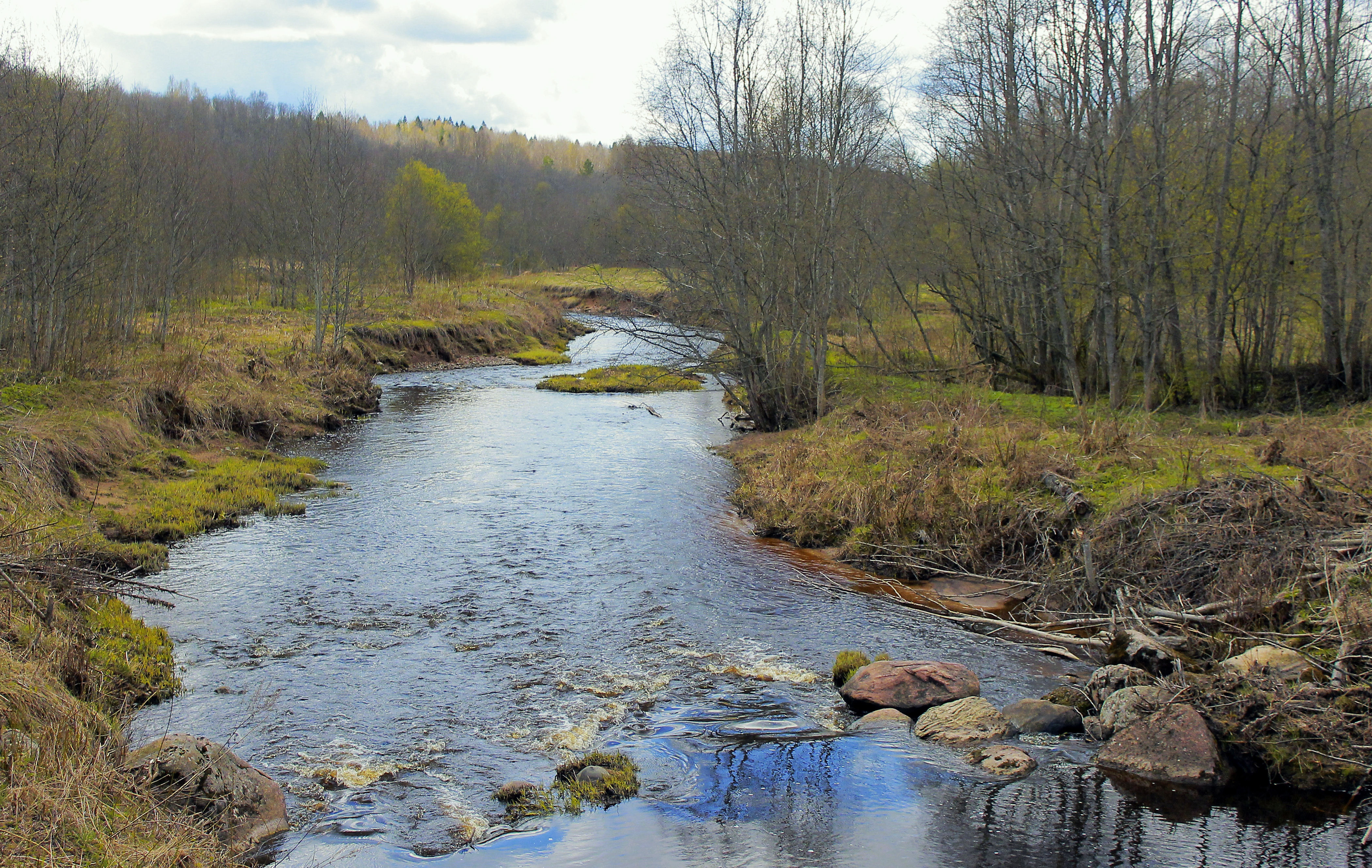 Ландшафт долины реки Веребушка, Маловишерский район This image is related to the protected area of Russia number 5320155